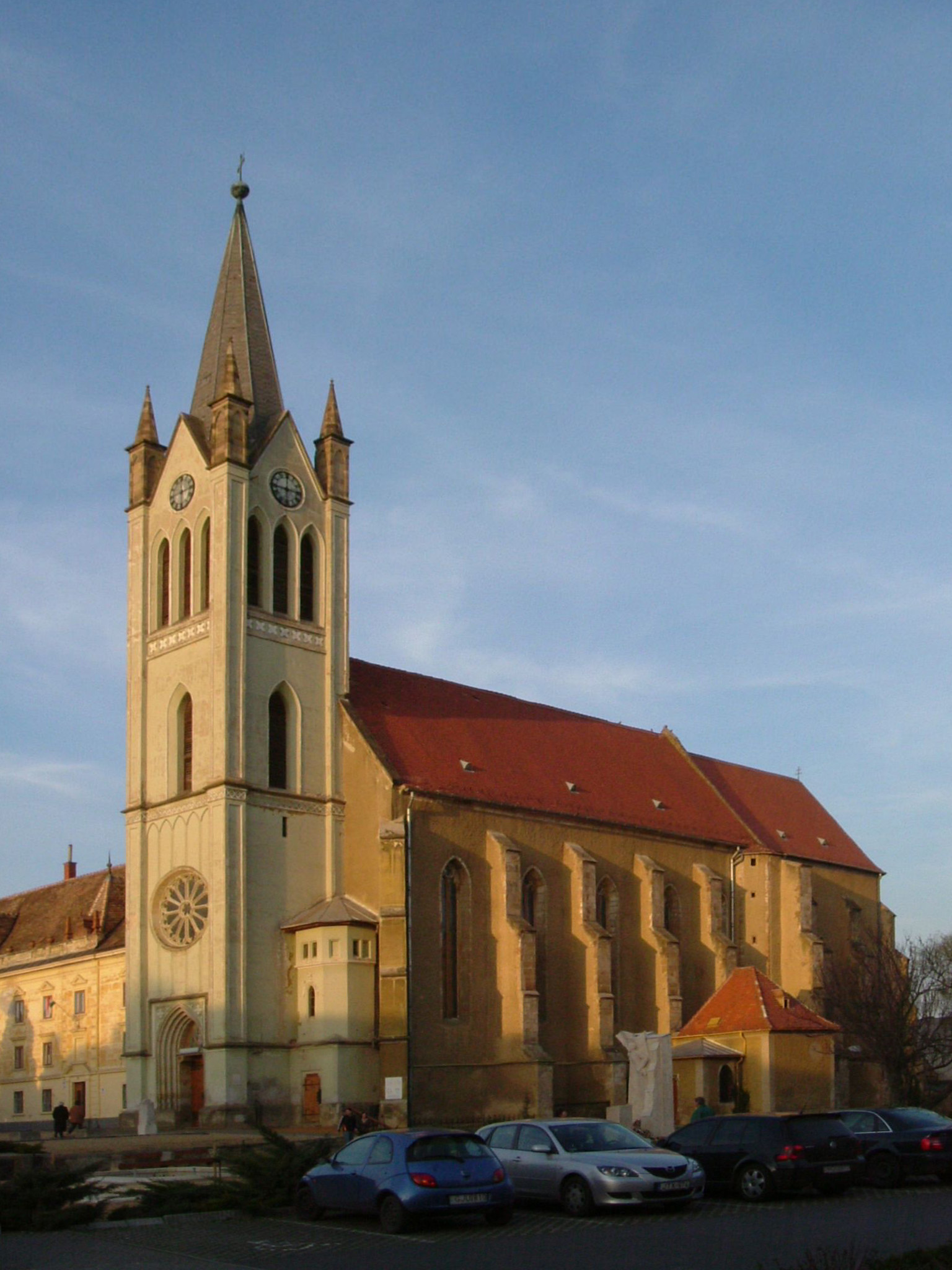 Keszthely - Hungary. Gothic church. Kármelita Kis Szent Teréz bazilika